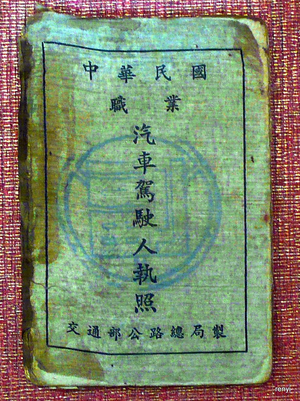 舊版中華民國職業汽車駕駛人執照，交通部公路總局製。